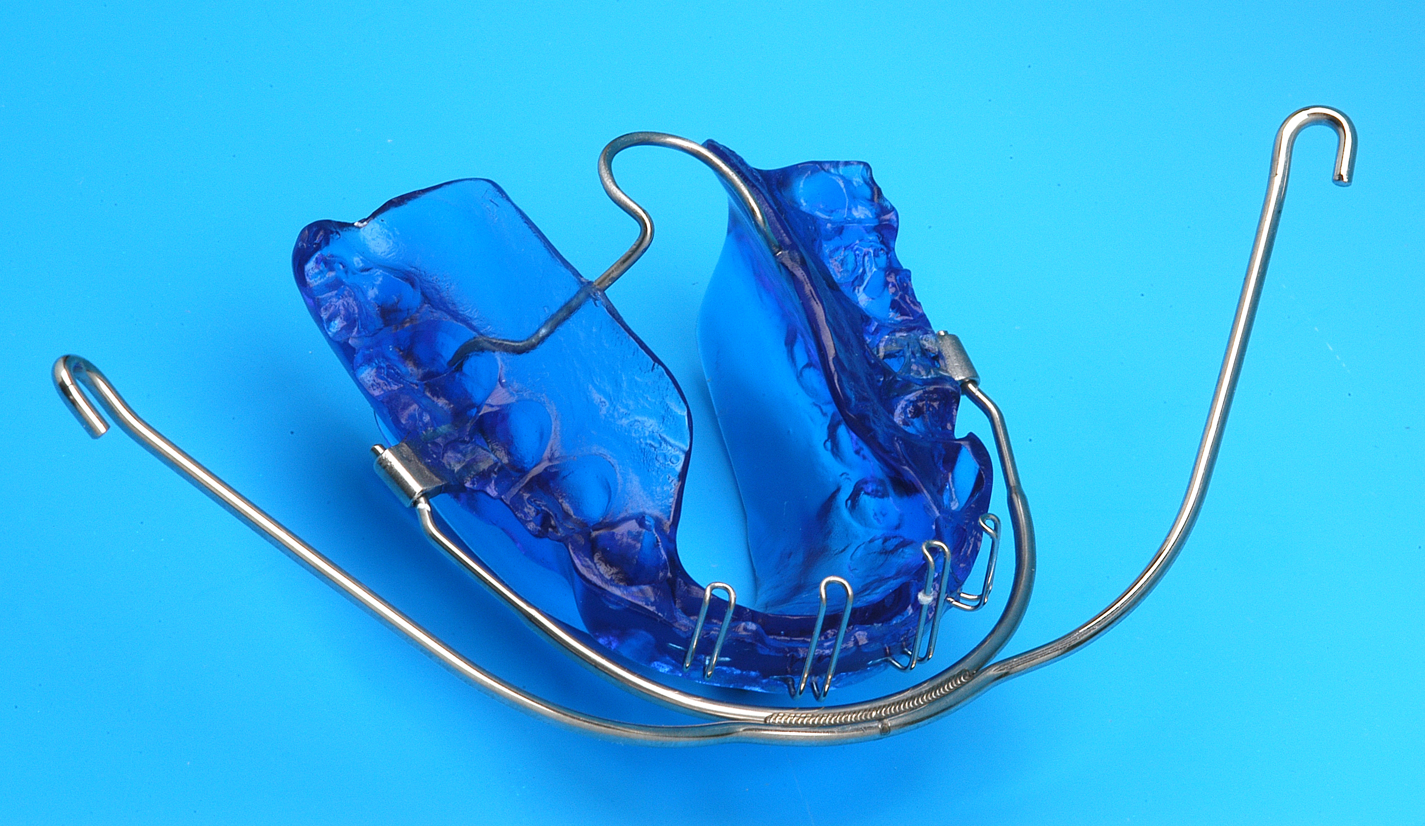 Kieferorthopädische Apparatur für die Therapie des Distalbisses